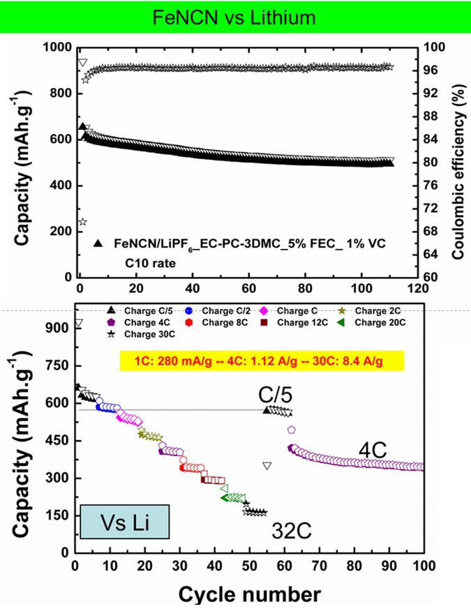 Electrochemical performance of FeNCN as anode material for Li-ion batteries